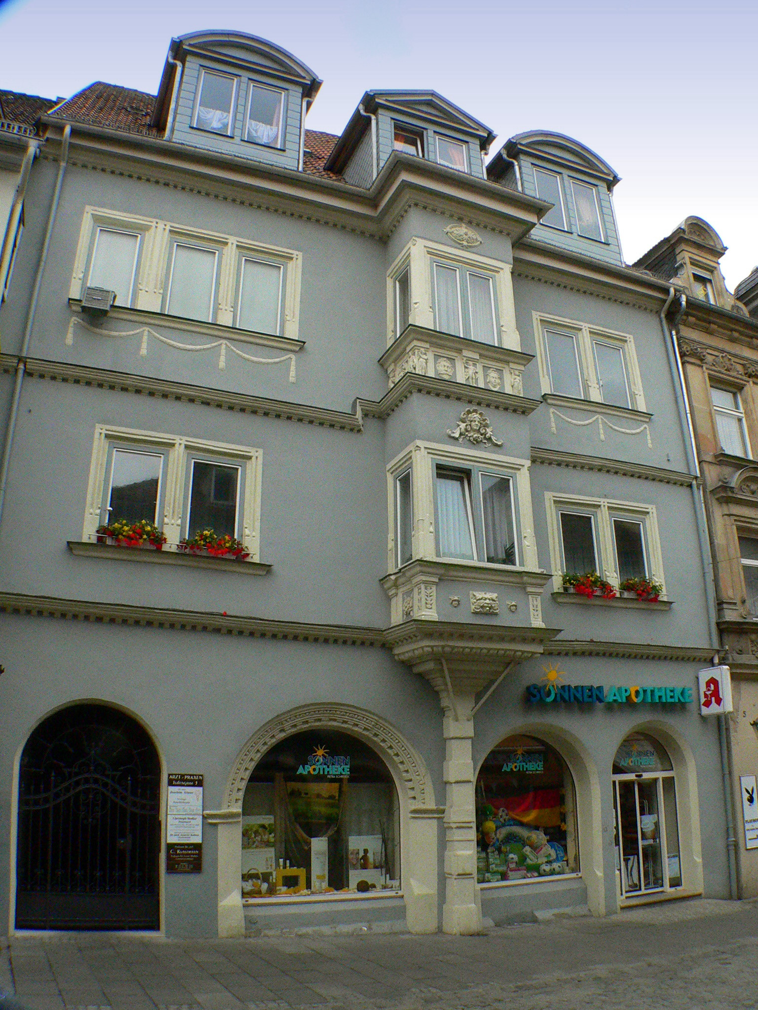 Coburg Judengasse 3 - Haus unter Denkmalschutz